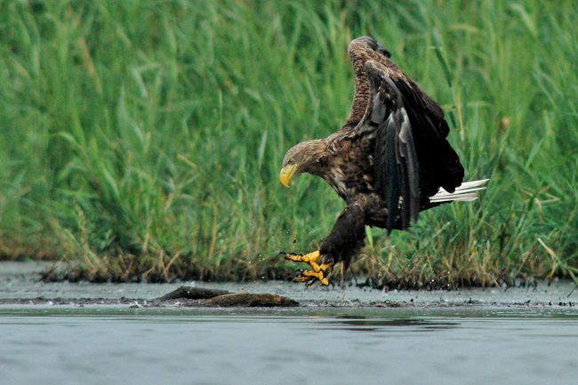 zdjęcie bielika